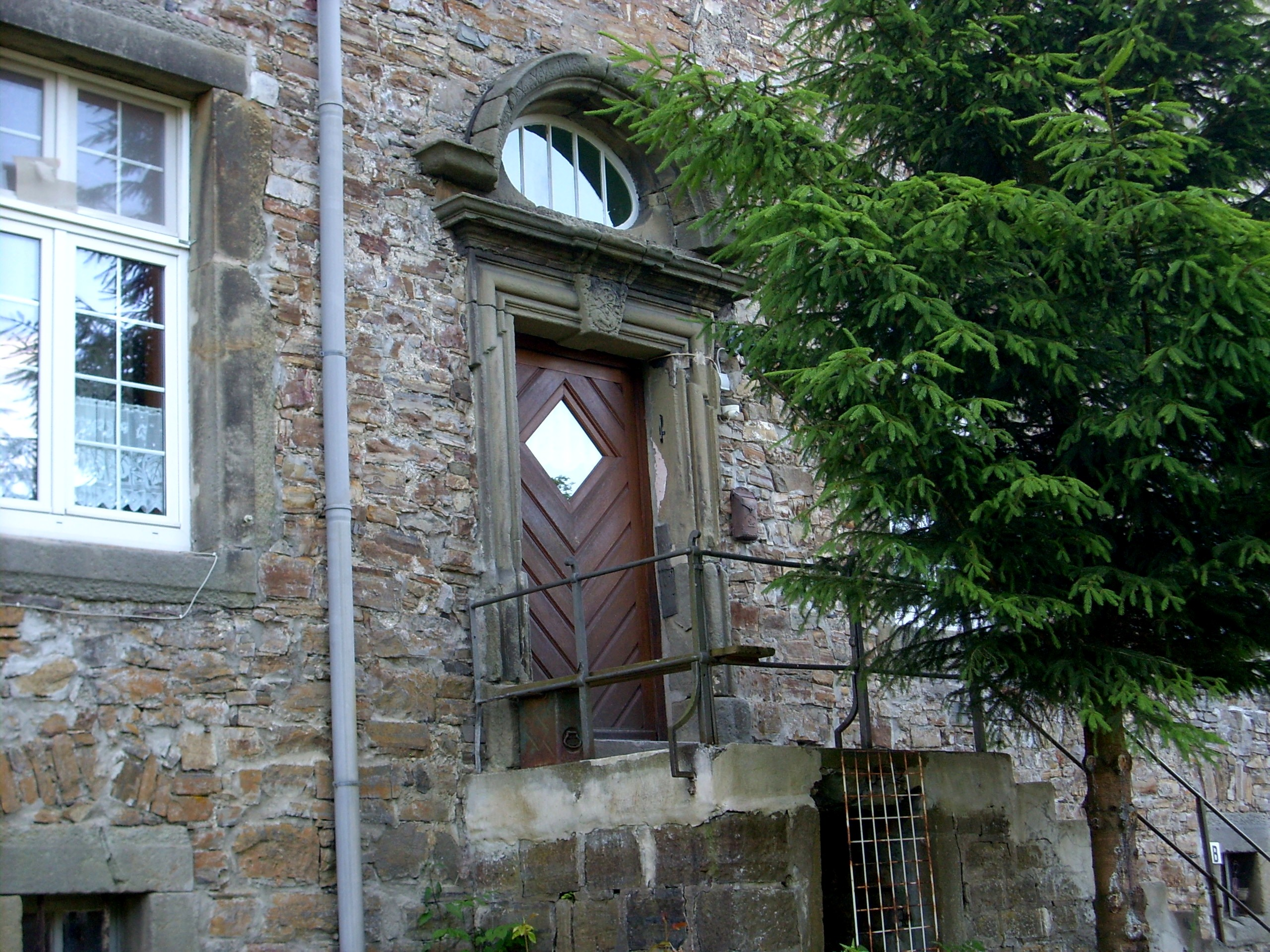 Ehemaliges Kloster Galiläa Eingang